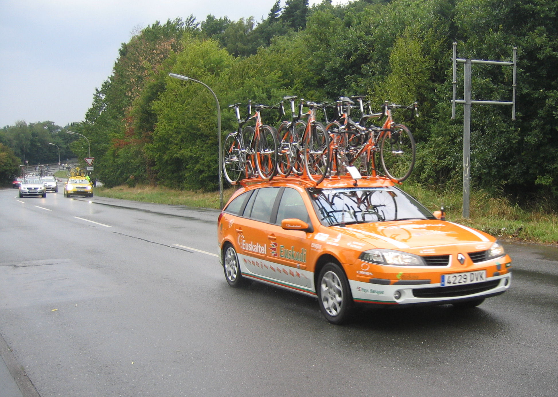 Begleitfahrzeug Euskatel Deutschlandtour 2006, 1. Etappe